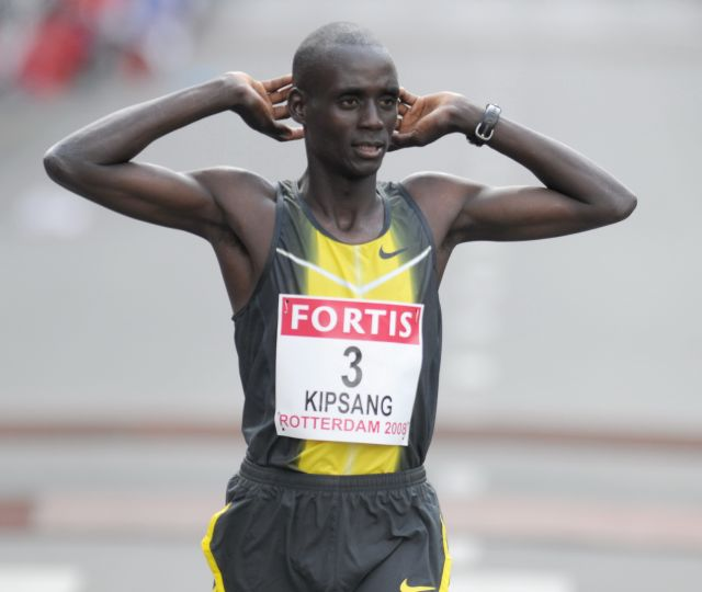 William Kipsang during Rotterdam Marathon